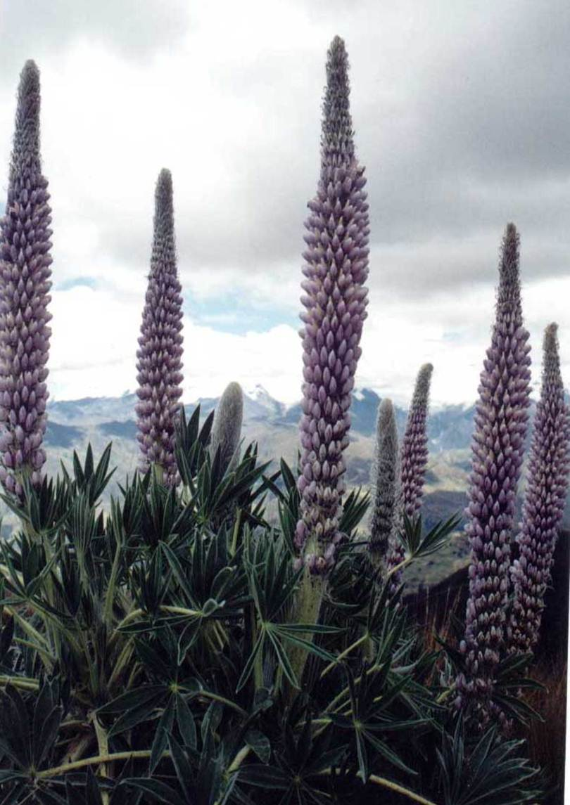 Esta imagen corresponde a Lupinus weberbaueri, que también crece en el distrito de Casca. Es un pariente silvestre del "chocho" o "tarwi", Lupinus mutabilis.